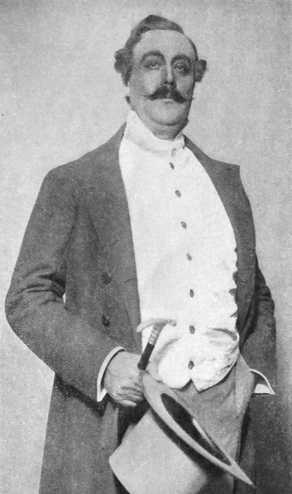 Svenske skådespelaren Oscar Byström som von Rambow i Livet på landet.